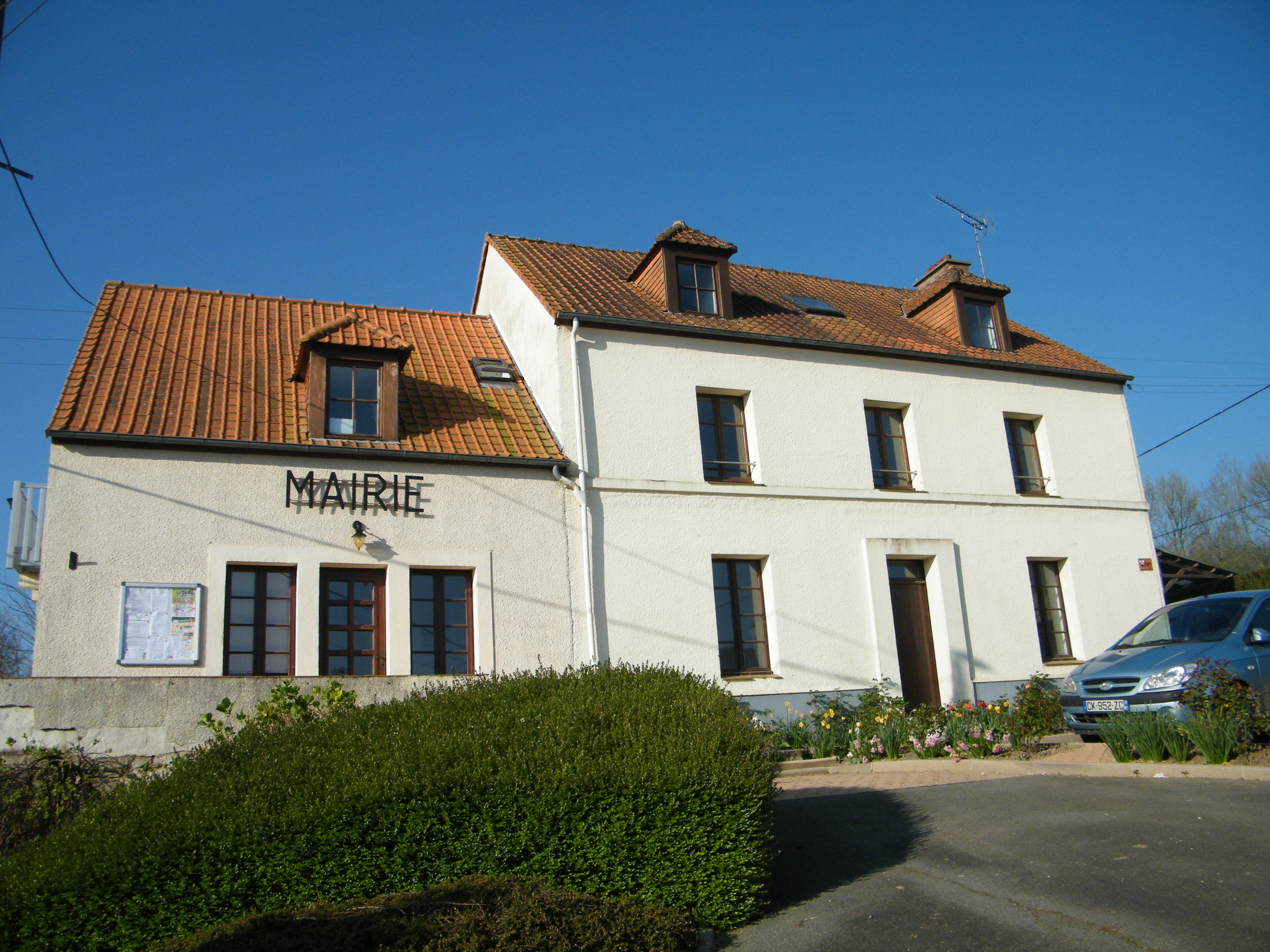 Bezinghem, Pas-de-Calais, Fr, mairie et gîte communal.